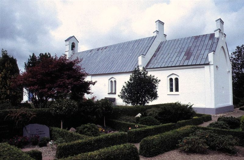 Sir Kirke i Danmark. Sir kirke